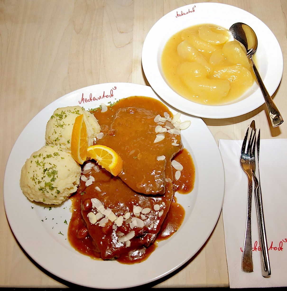 Rheinischer Sauerbraten vom Pferd in Rosinensauce mit Klößen und Apfelmus, im einstmaligen Lokal „Haus der Freude“ Elisabethstraße 82 in Unterbilk von Manes Meckenstock